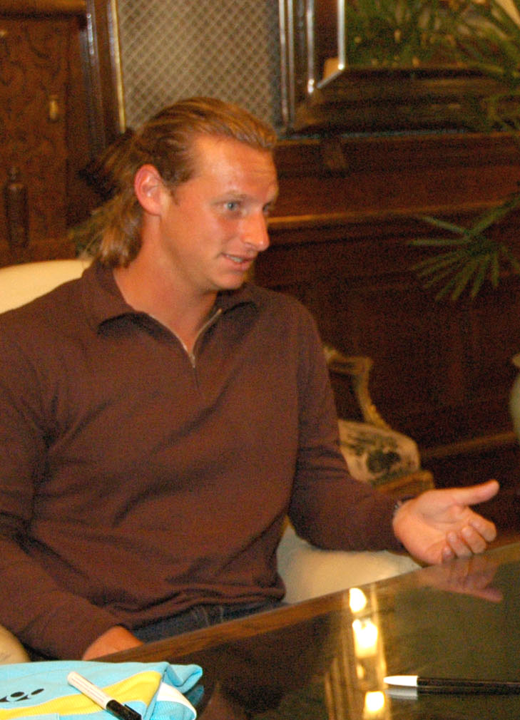 El tenista argentino David Nalbandian en una nueva reunión con Néstor Kirchner después de ganar junto al equipo de Argentina la semifinal de la Copa Davis ante Australia. 25 de septiembre de 2006, Casa Rosada, Despacho Presidencial, Buenos Aires, Argentina.